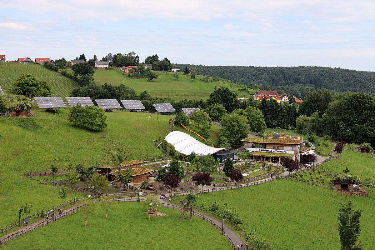 Essbarer Tiergarten als Teil der Zotter Erlebniswelt neben der Schokoladenmanufaktur